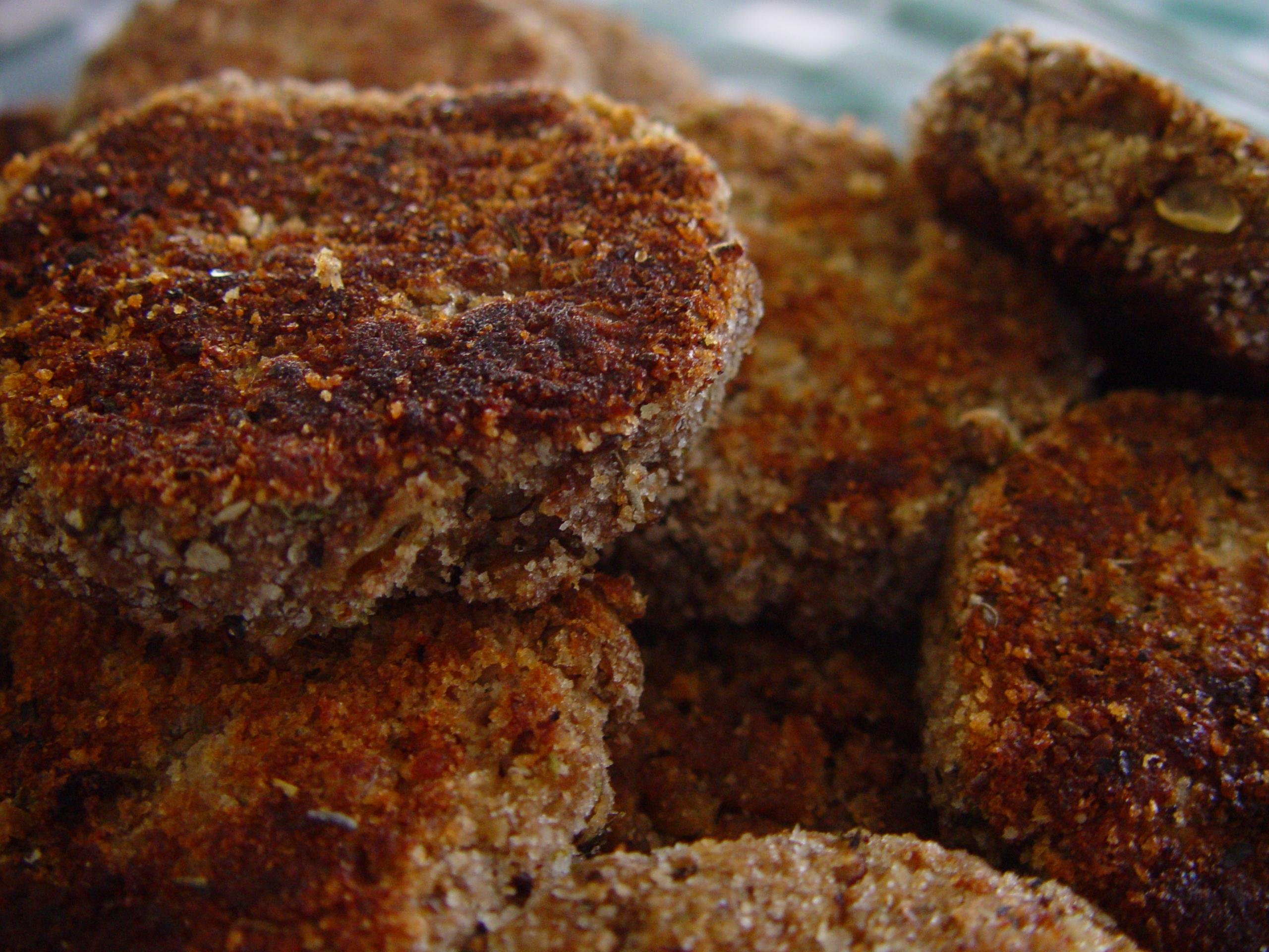 Bouletten fleischküchle frikadellen hackfleisch